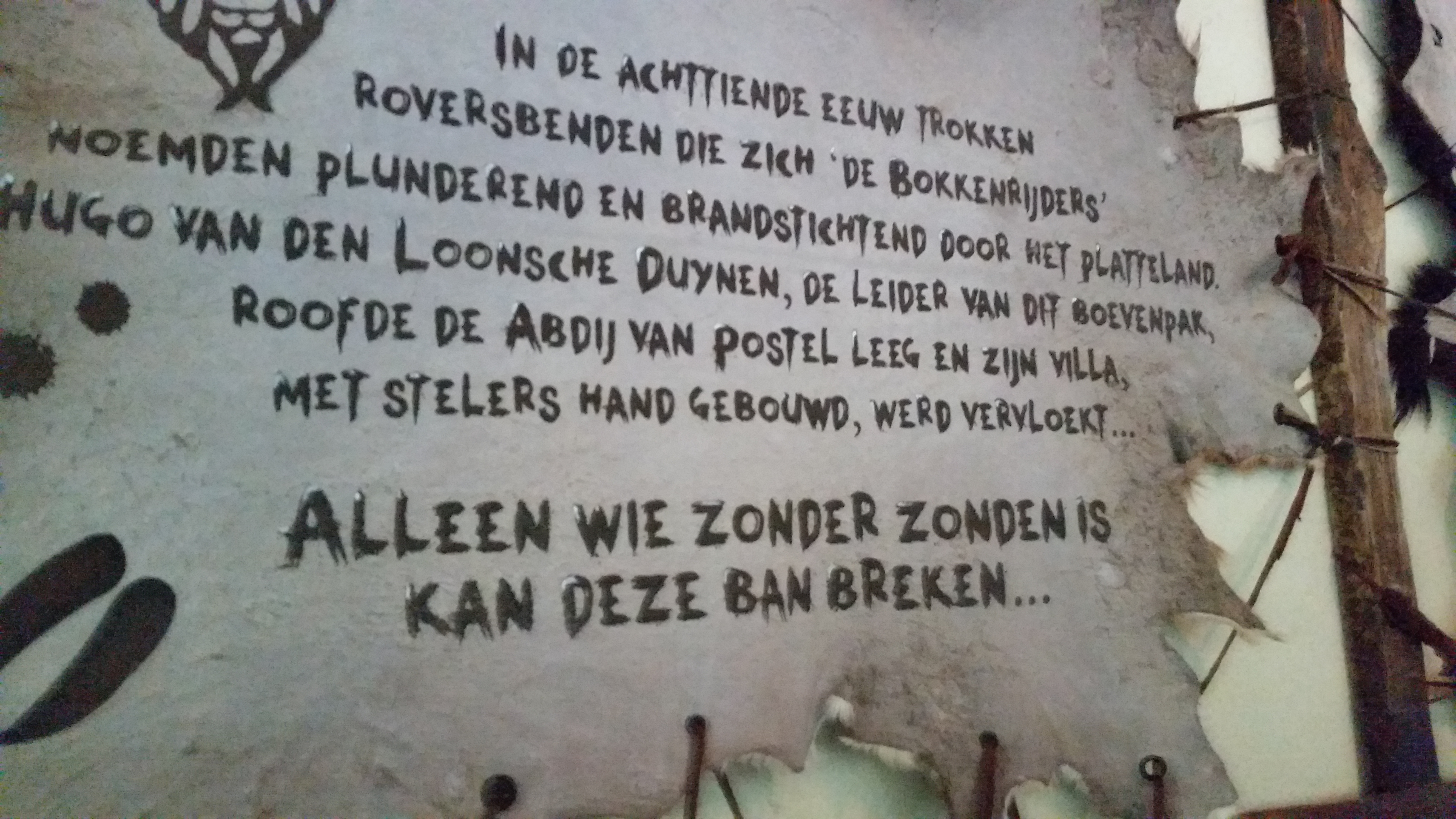 Vooraankondiging bij Villa Volta